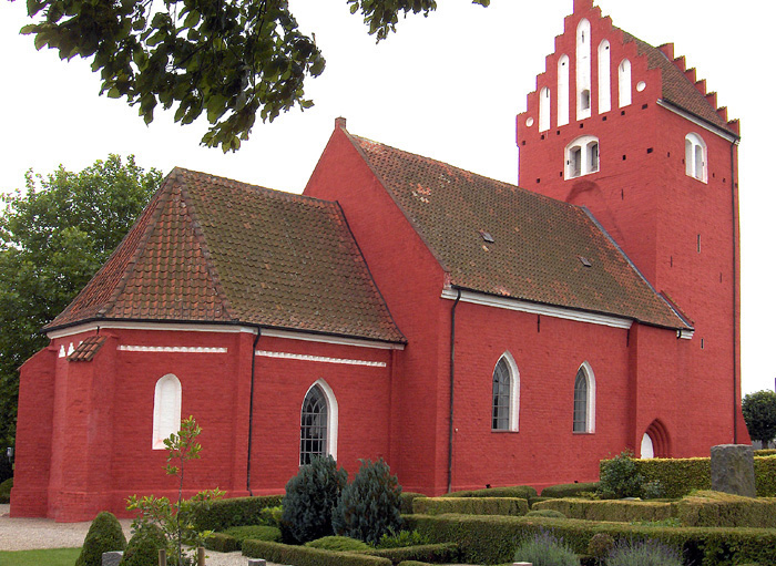 fra nordøst